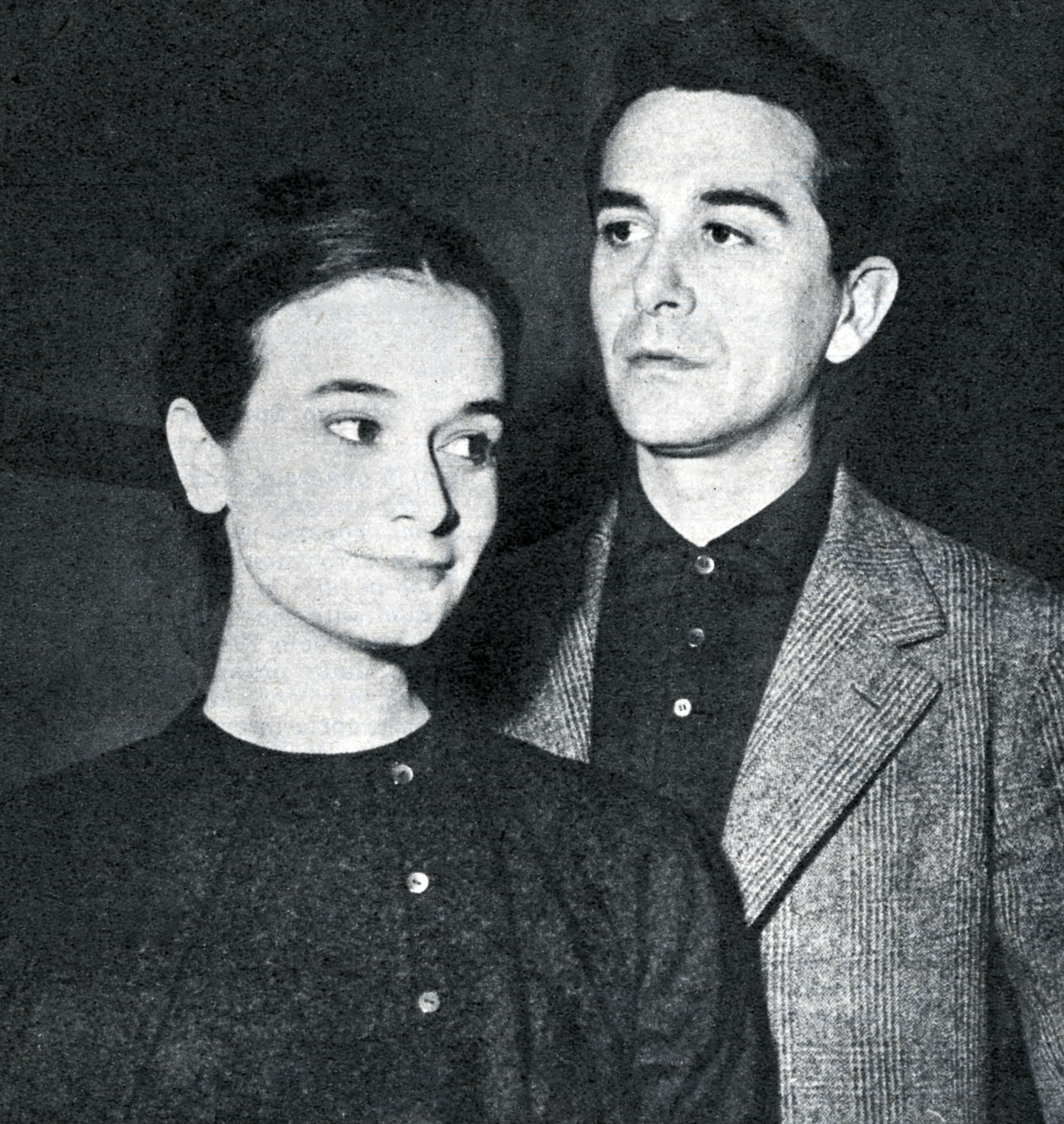 Anna Maria Guarnieri e Giorgio De Lullo attori